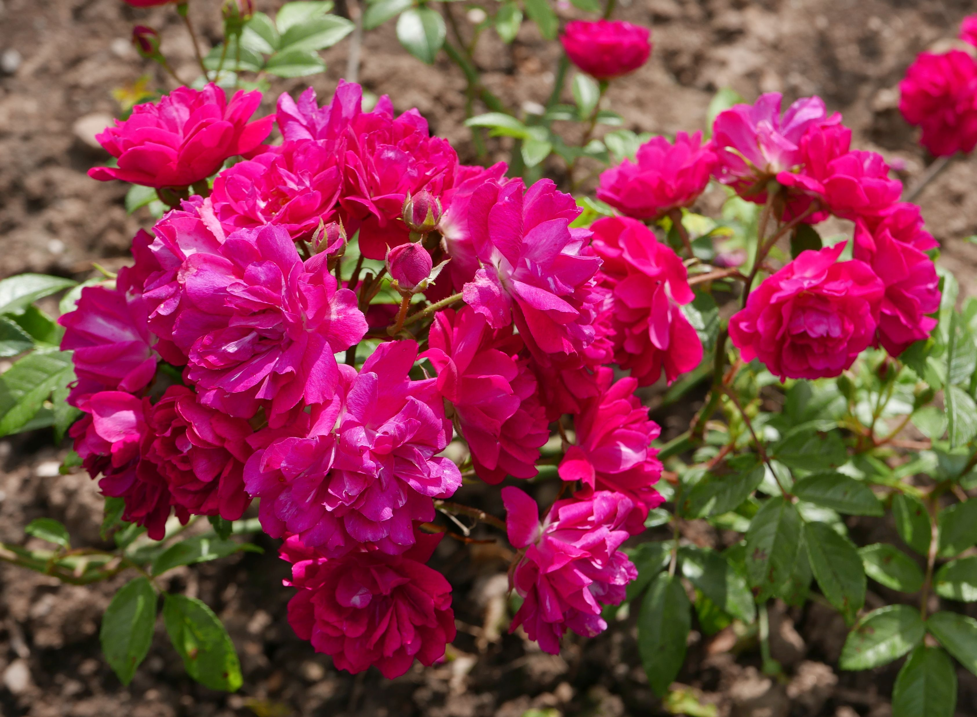 Rosa 'Pierre Cormier', Polyantharose, eingeführt von Eugène Turbat & Co. 1926